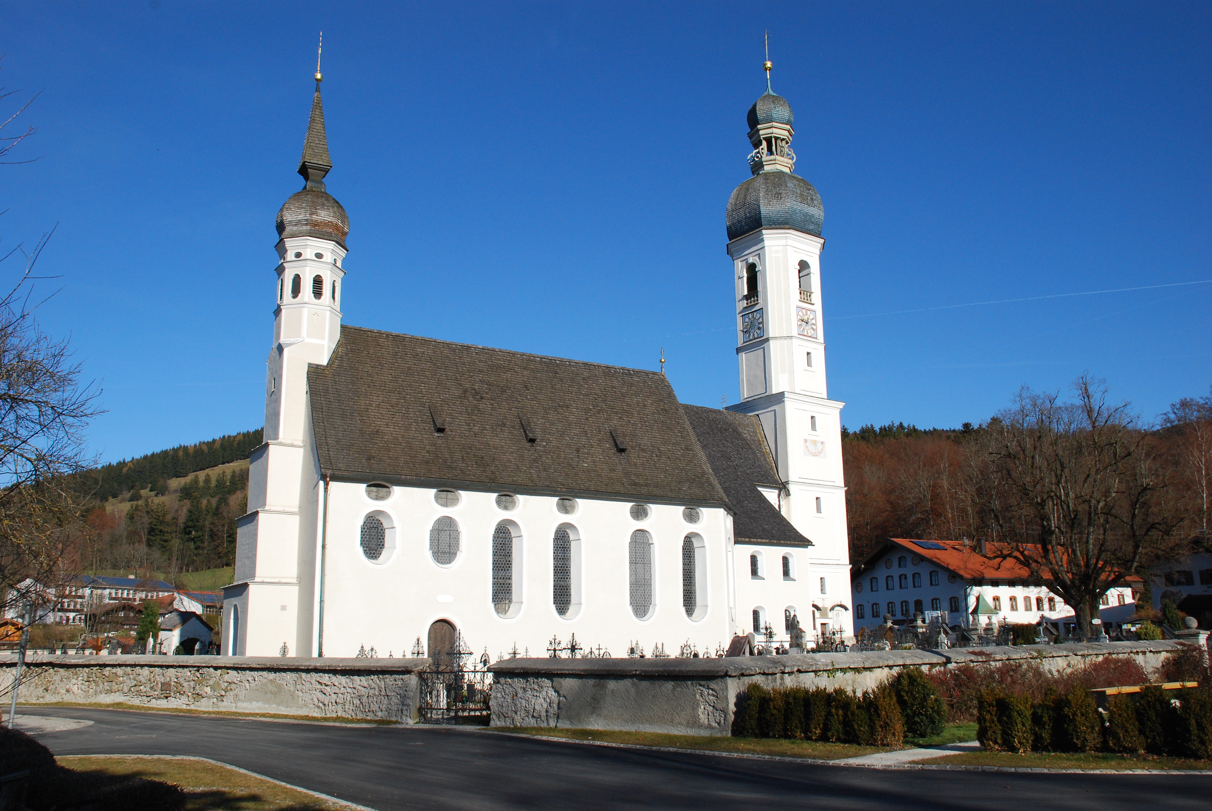 Friedhofskapelle Heilig Blut vor der Pfarrkirche St. Andreas in Elbach, Gemeinde Fischbachau, Landkreis Miesbach, Regierungsbezirk Oberbayern, Bayern. Als Baudenkmal in der Bayerischen Denkmalliste aufgeführt.